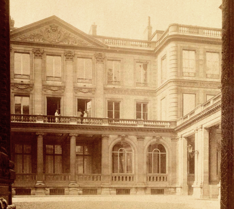 L'hôtel de Coigny au 89, rue du Fbg-St-Honoré, à Paris. Photographie d'Eugène Atget (1857-1927) ; juillet 1901